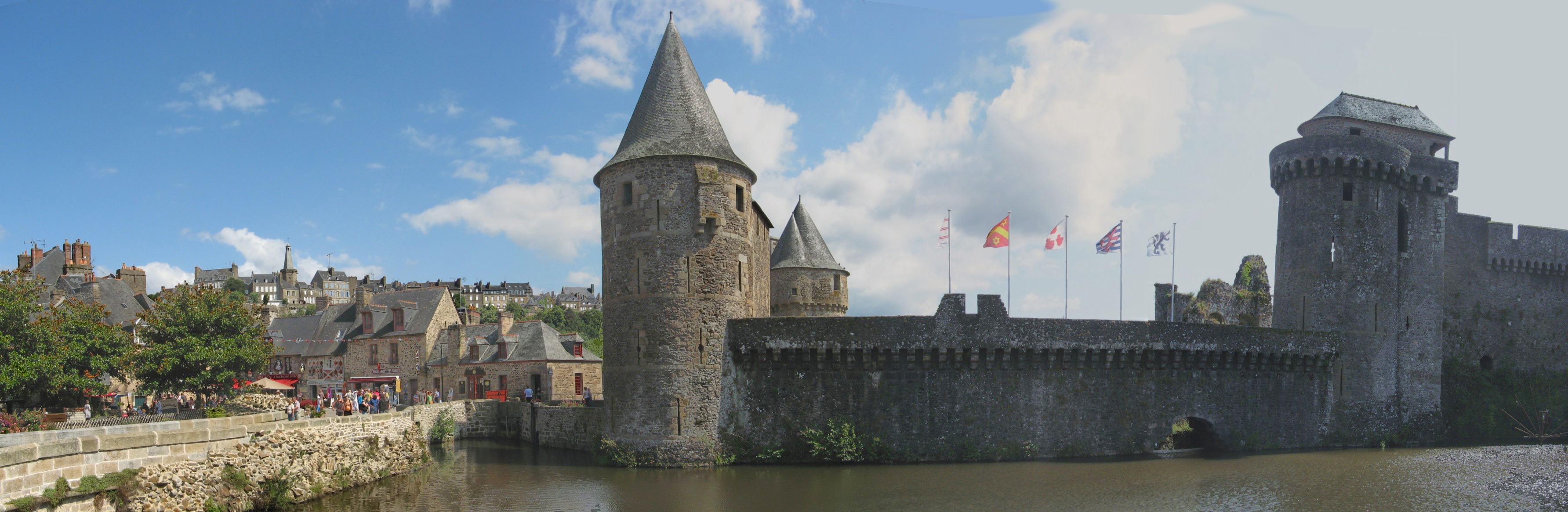 Vue panoramique du château de Fougères. Ille-et-Vilaine. France. De gauche à droite: tours de Guémadeuc, de la Haye-Saint-Hilaire, du Hallay, de Coëtlogon (ruines) et de Coigny.